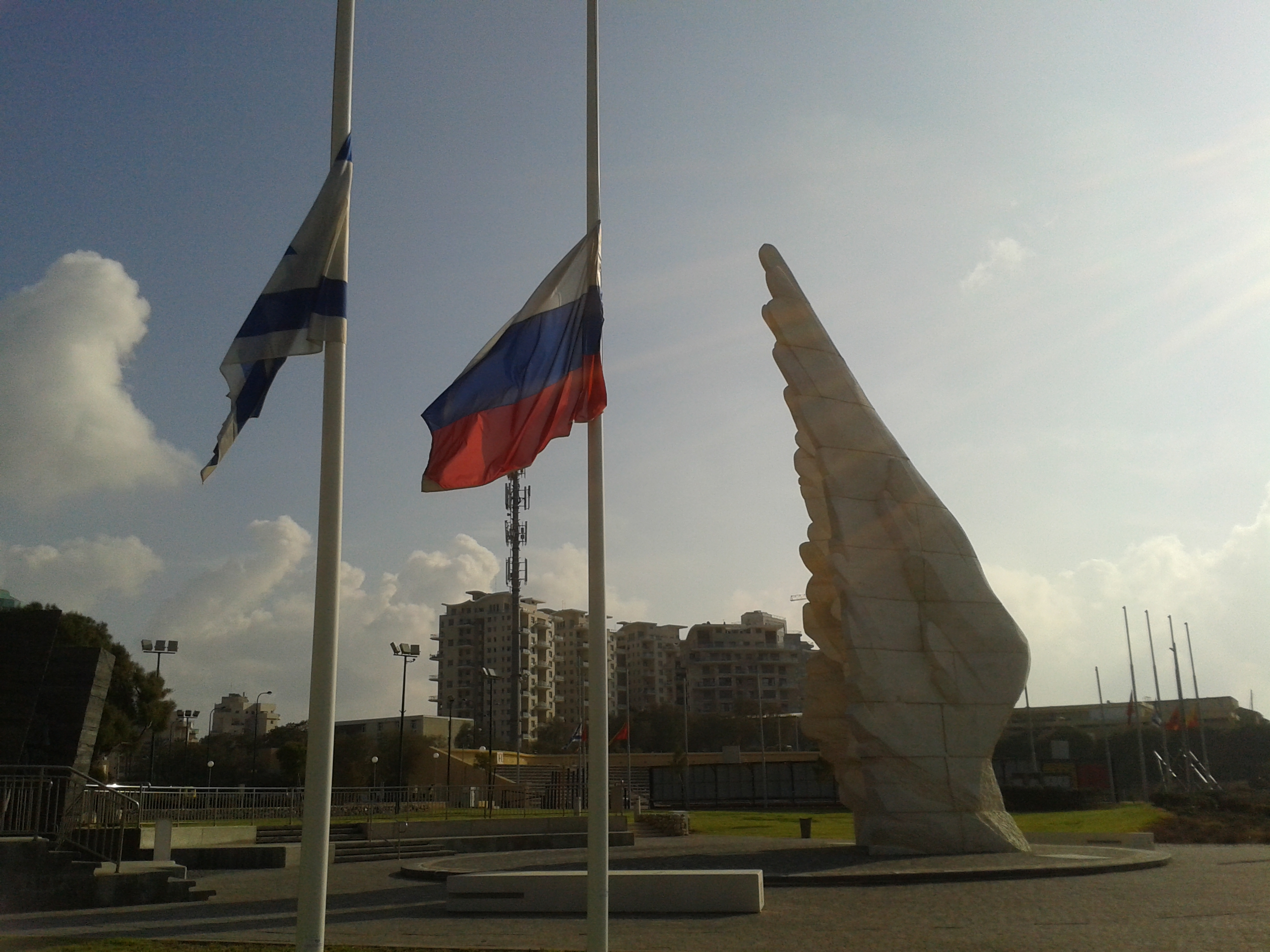 Netanya, Israel